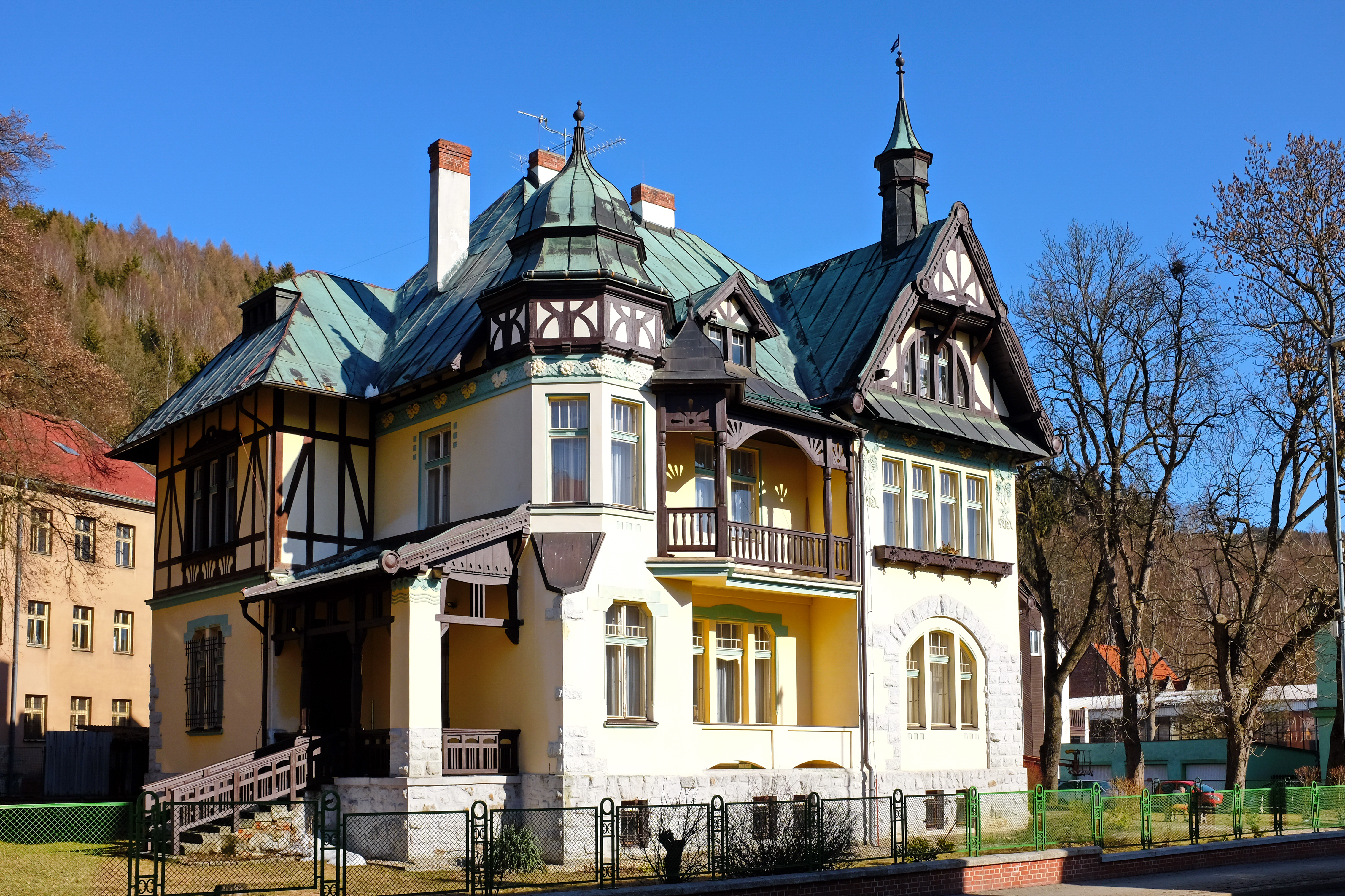 Vila továrníka Wilhelma Fuchse, Dukelská 1128/37, Kraslice (okres Sokolov).